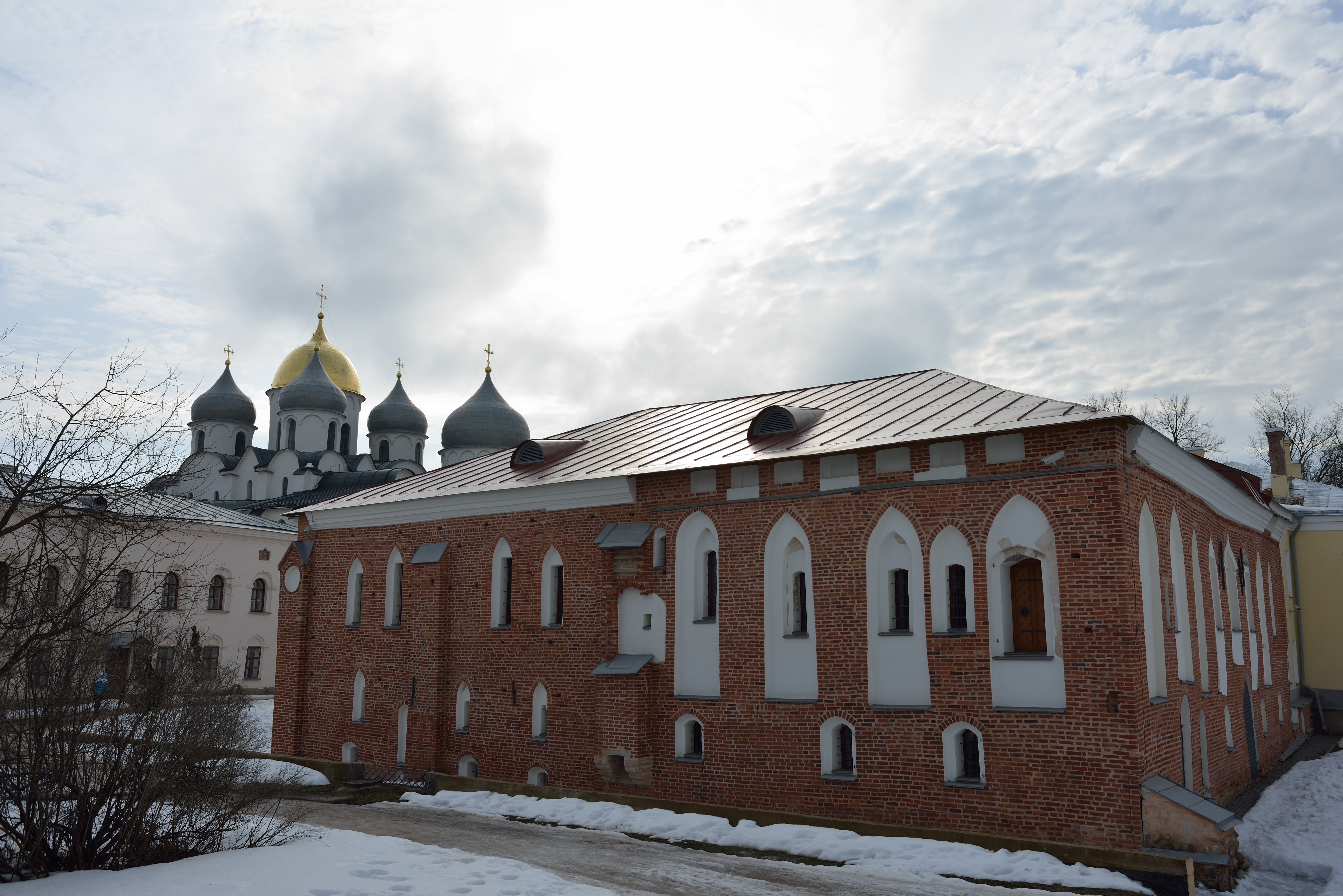 Палата Грановитая (Владычная): стр.13, Великий Новгород, Новгородская область